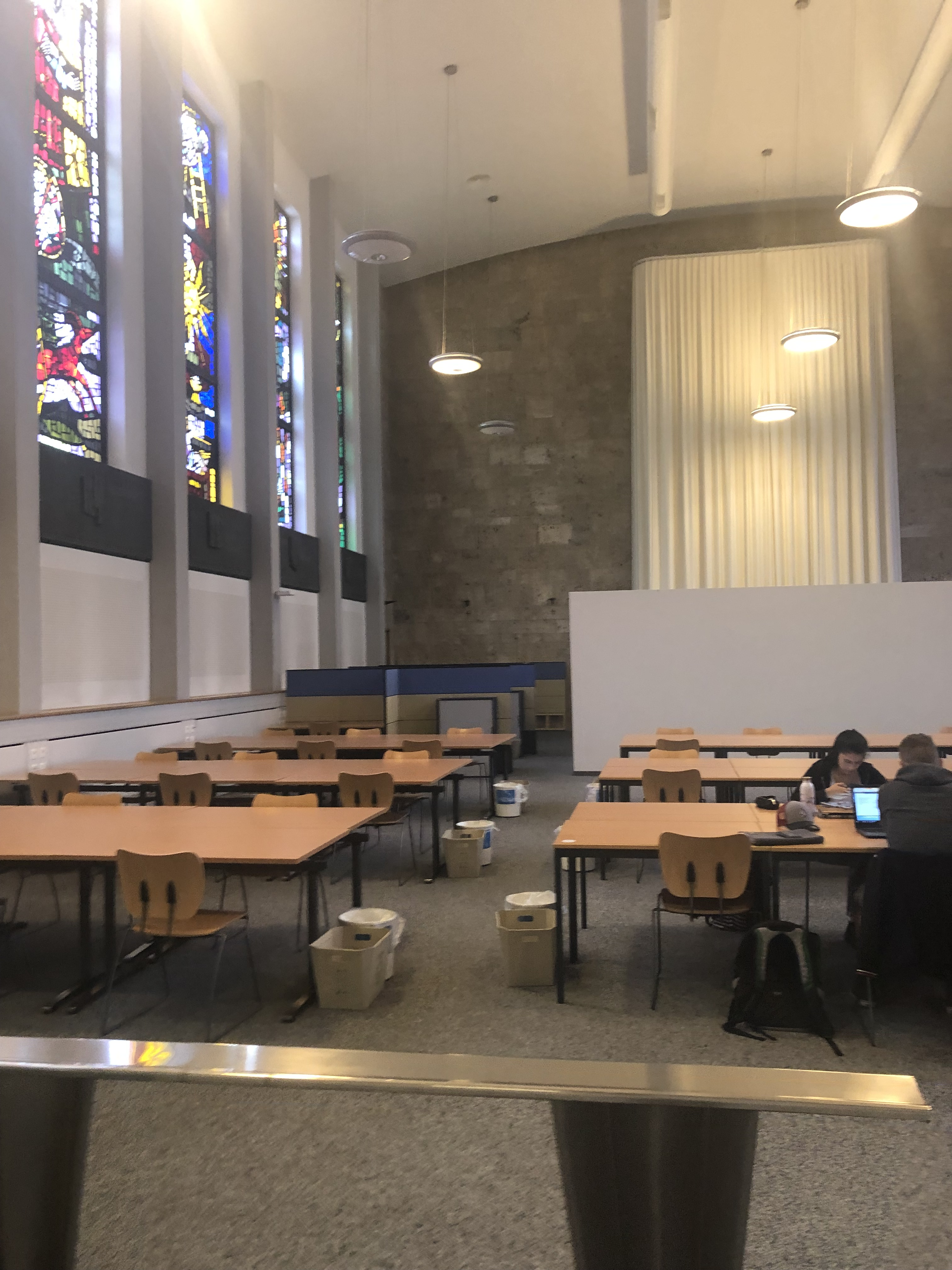 Universität Freiburg (Schweiz): Studiensaal Regina Mundi (war eine Kapelle)